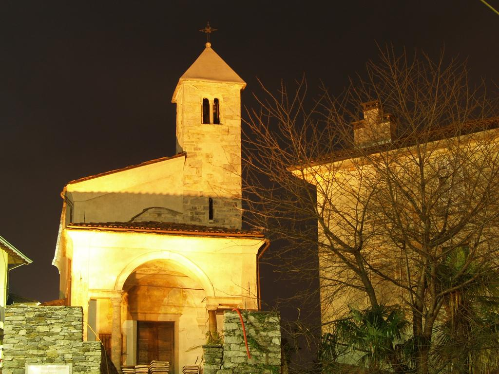 L'Oratorio dei SS. Fabiano e Sebastiano. Situato di fronte al lungolago di Suna, risale al XII secolo e ristrutturata ed ampliata nel XVII e XVIII secolo aggiungendo tra l'altro il portico e la scalinata che sale dal lago fino alla chiesa.